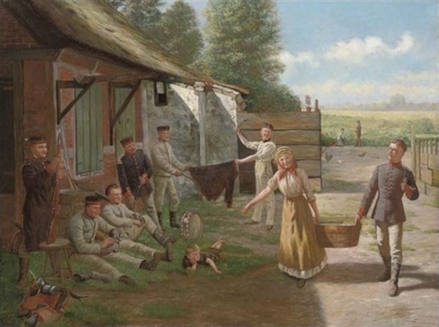 Eine helfende Hand 1911 88 x 115,7 cm